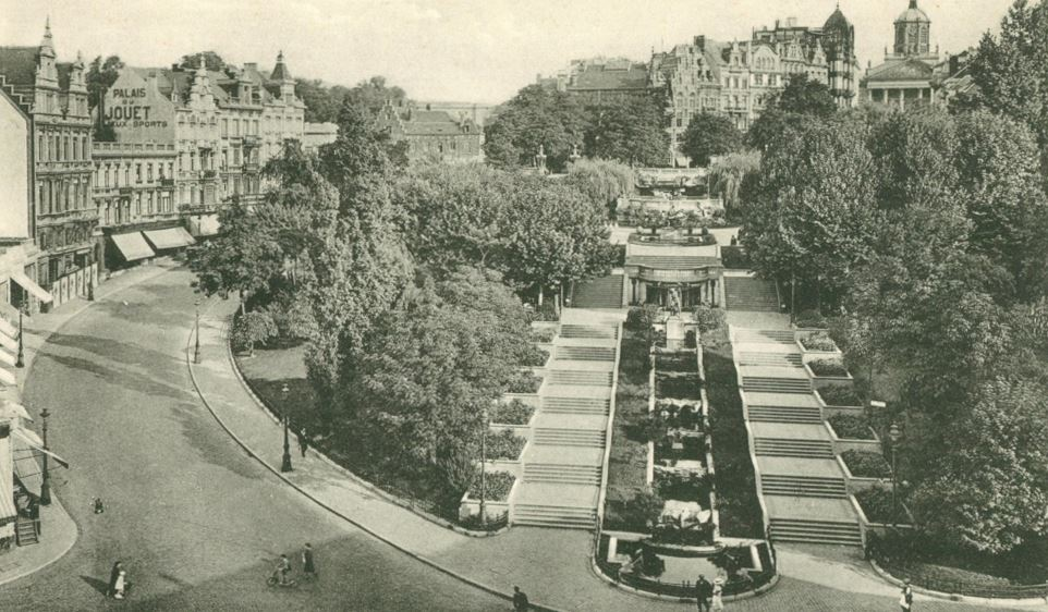 Carte postale française du Mont des Arts et la rue courbe, ca. 1925-1930